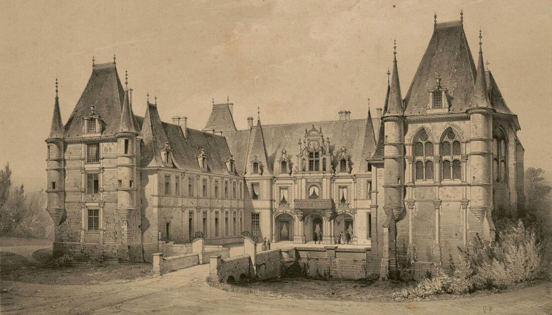 Le château de Marchais à la fin du XIXe siècle.